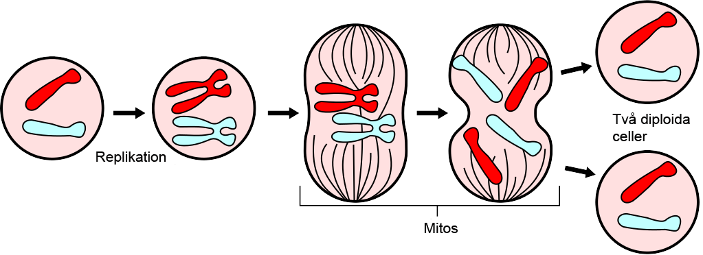 Större händelser i mitos.